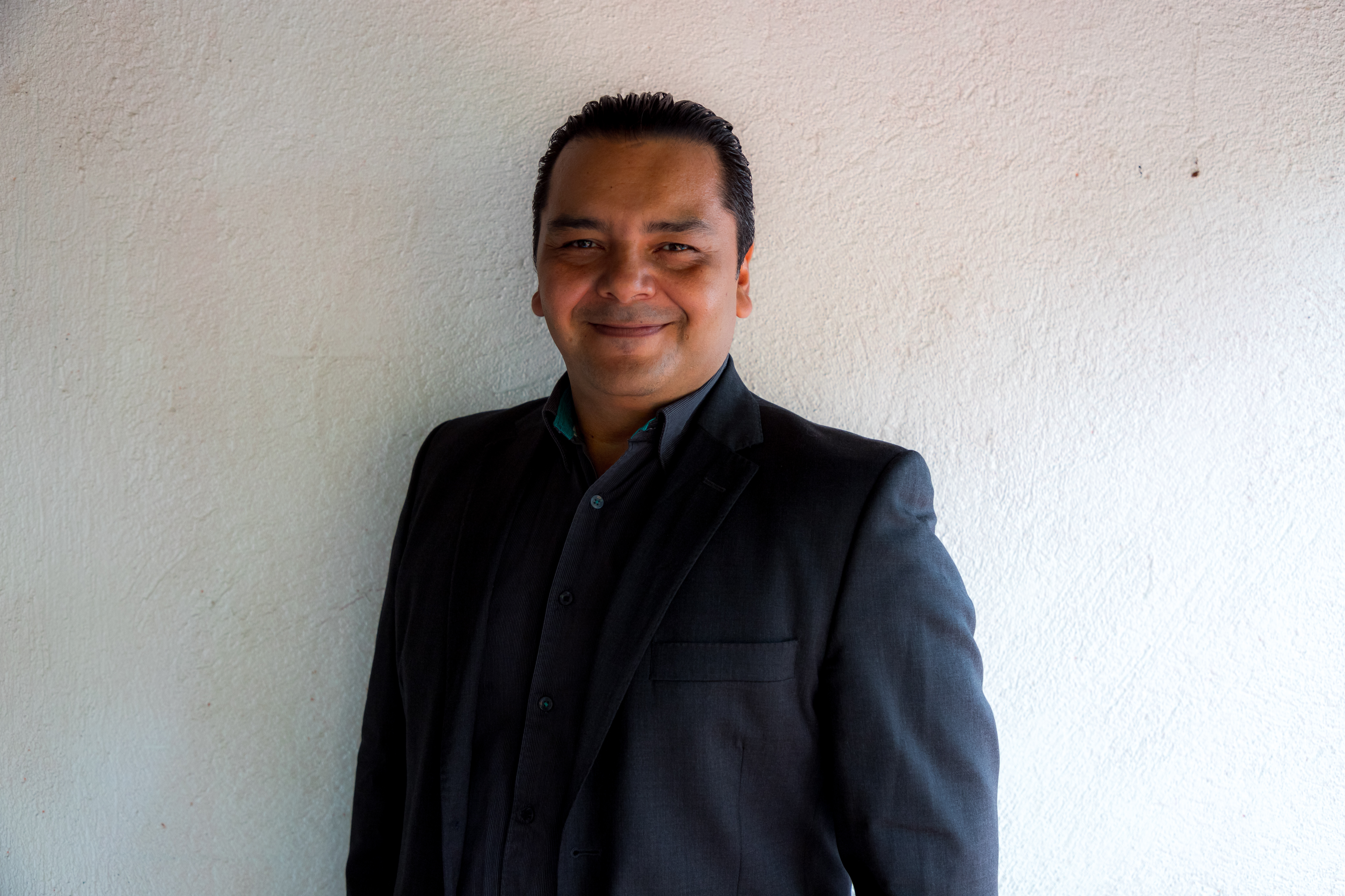 Autor de "Tras la pista Azul", "Perseo TS" e "itzelina y los rayos del sol".